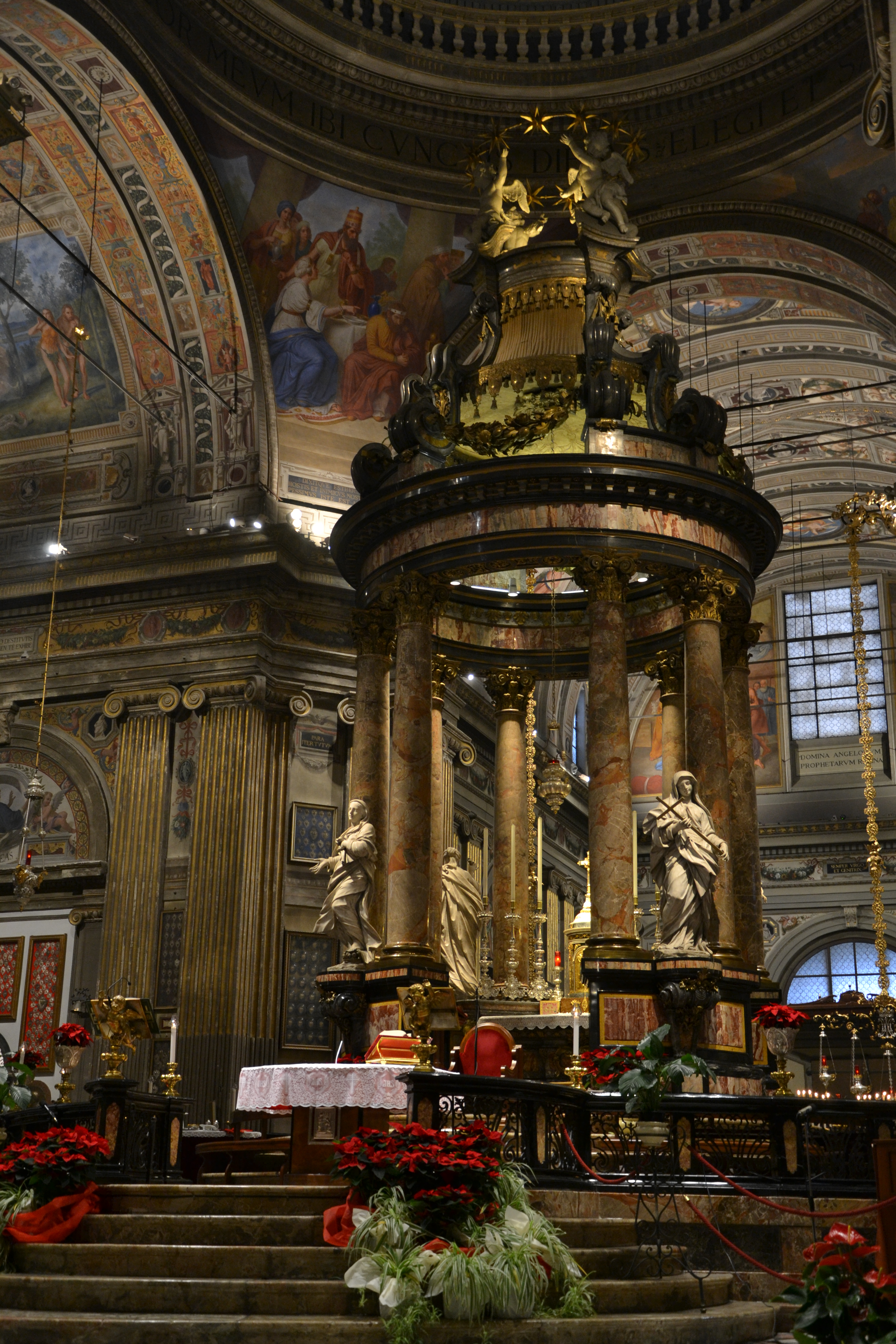 Sanctuary of Caravaggio - Main Altar by Filippo Juvarra